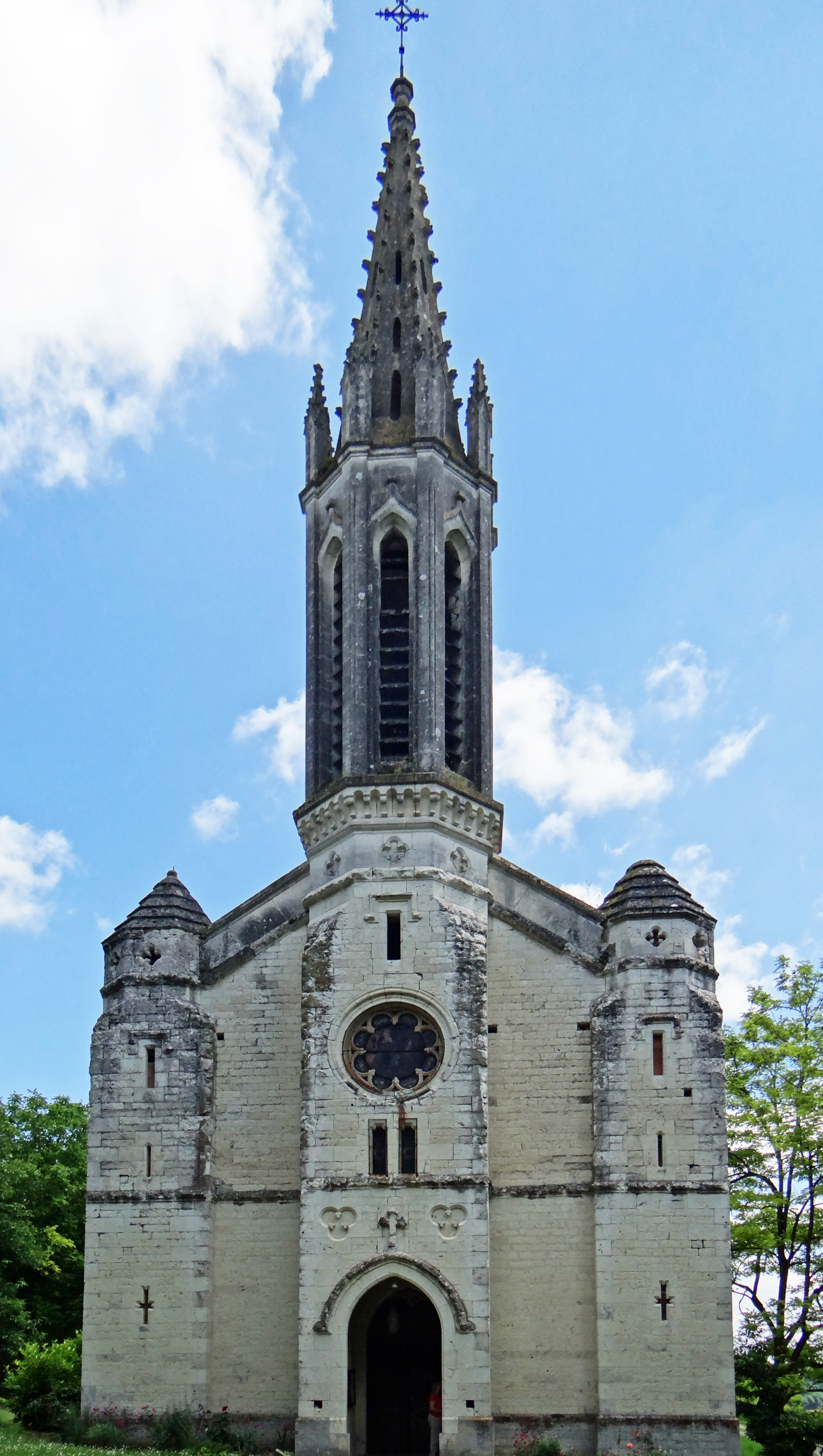 Saint-Mézard - Chapelle Notre-Dame-d'Esclaux